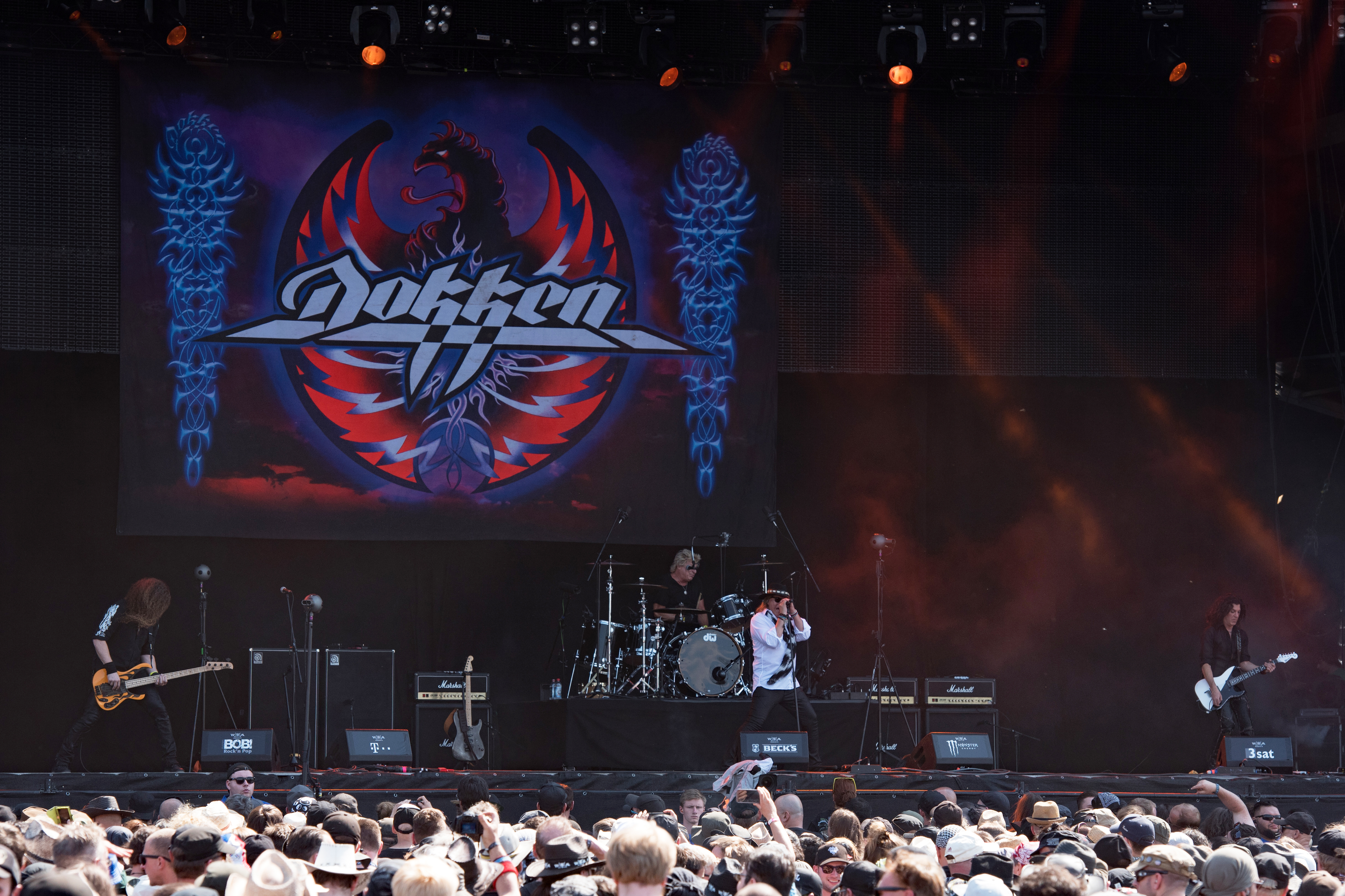 Dokken beim Wacken Open Air 2018